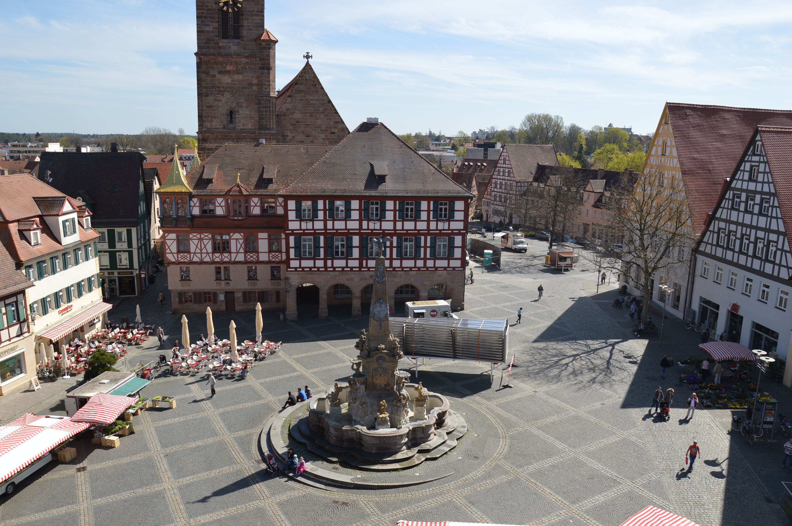 Das Schwabacher Rathaus mit der Stadtkirche und dem Königsplatz